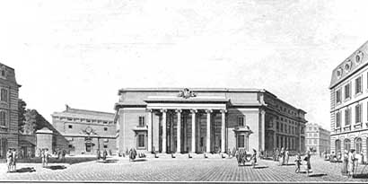 Projet de palais de justice à Caen en 1788